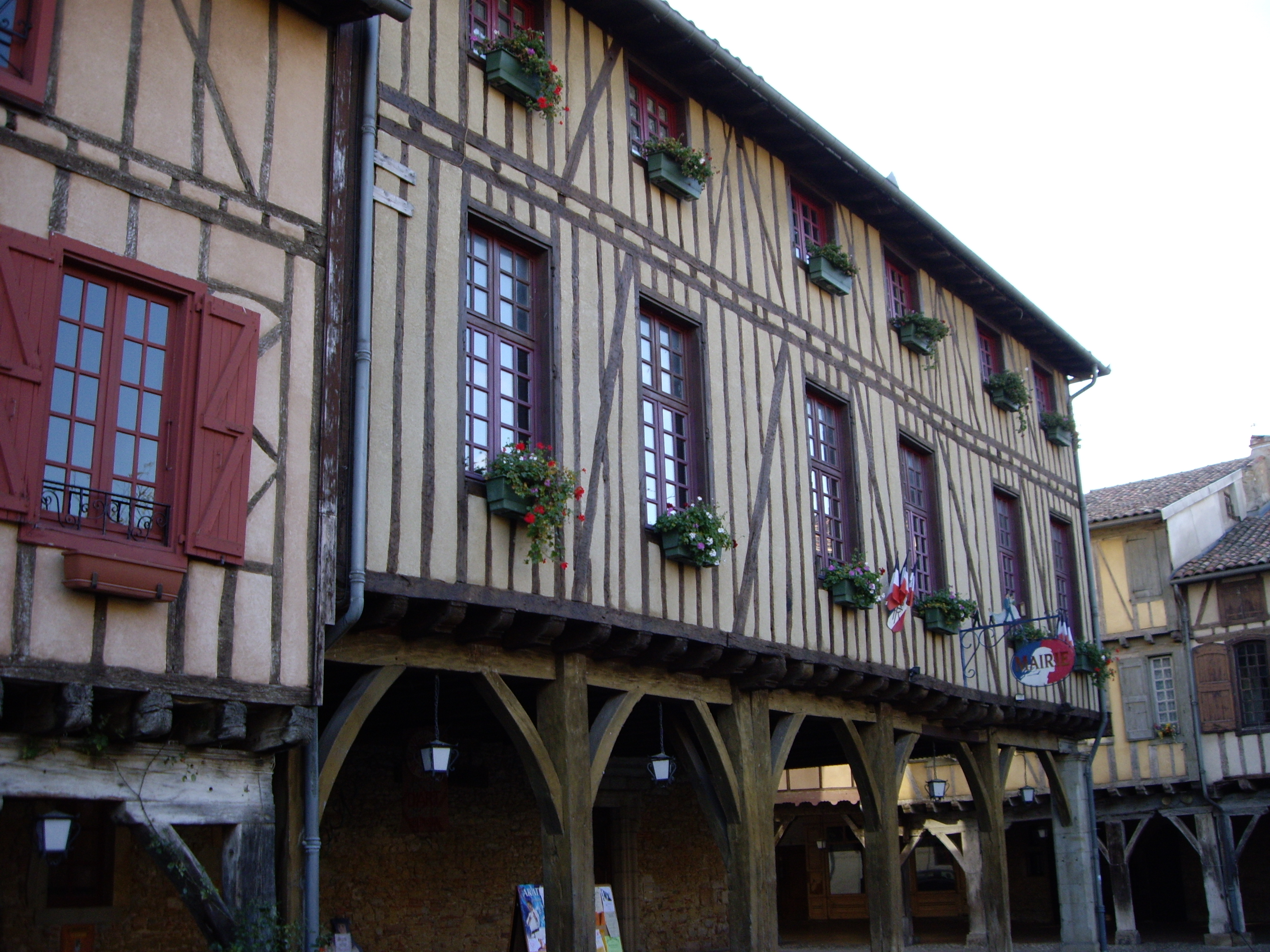 Mairie de Mirepoix (09)